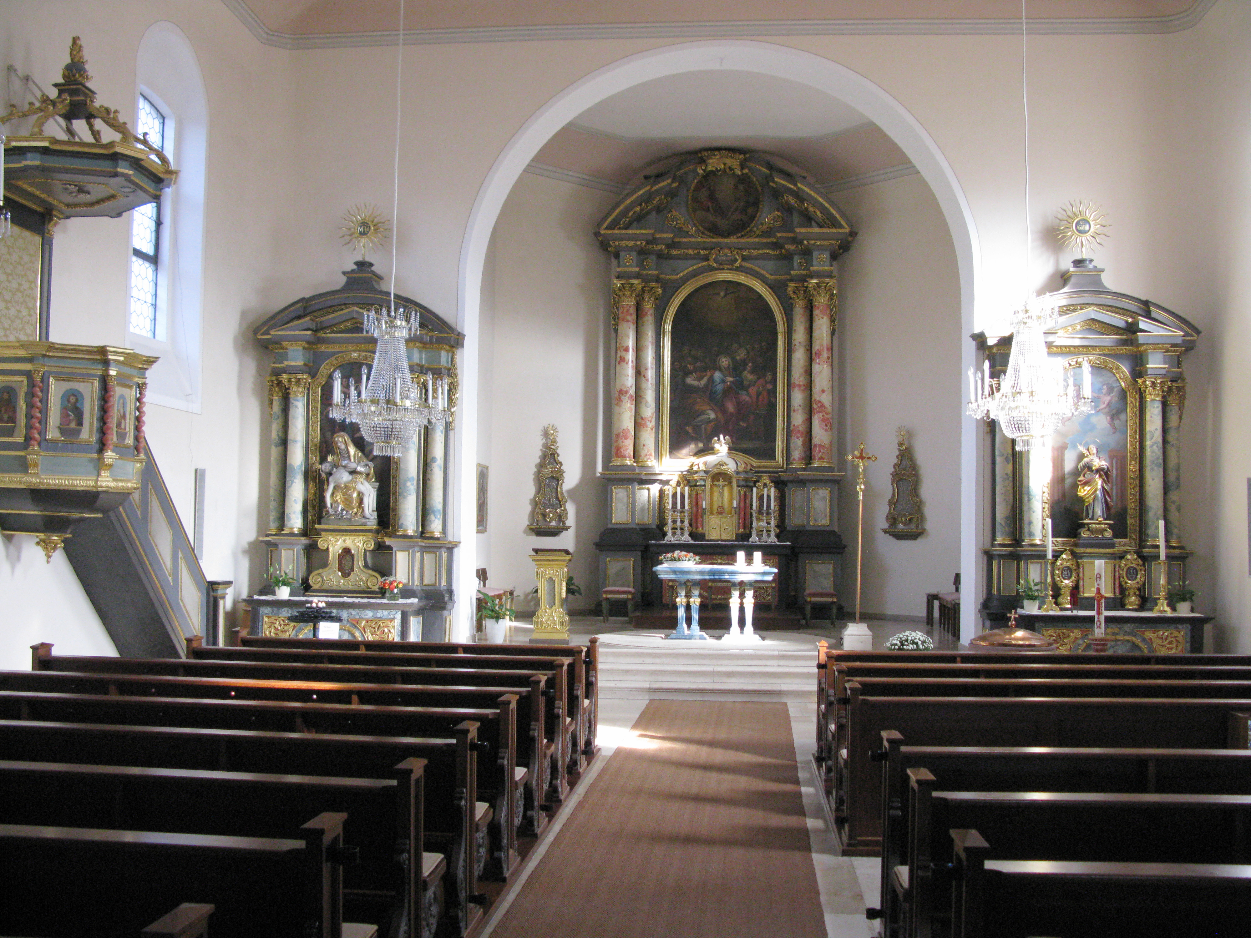 Sankt Agatha in Horben